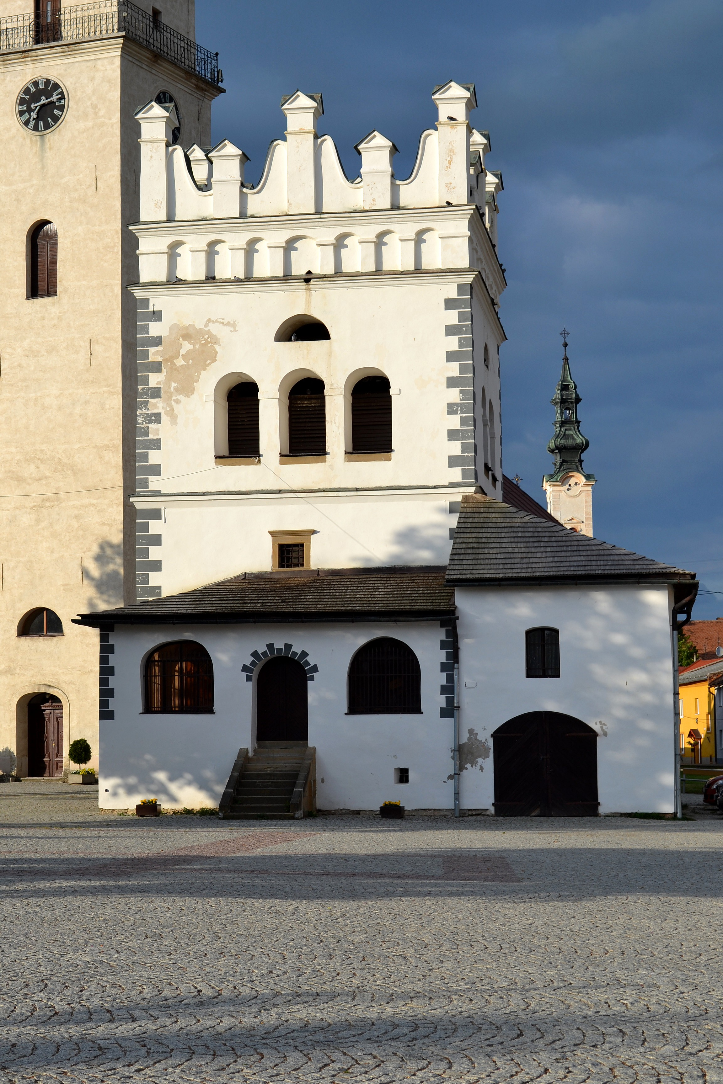 Renesančná zvonica z roku 1659 na Mariánskom námestí v Podolínci; pohľad od juhozápadu